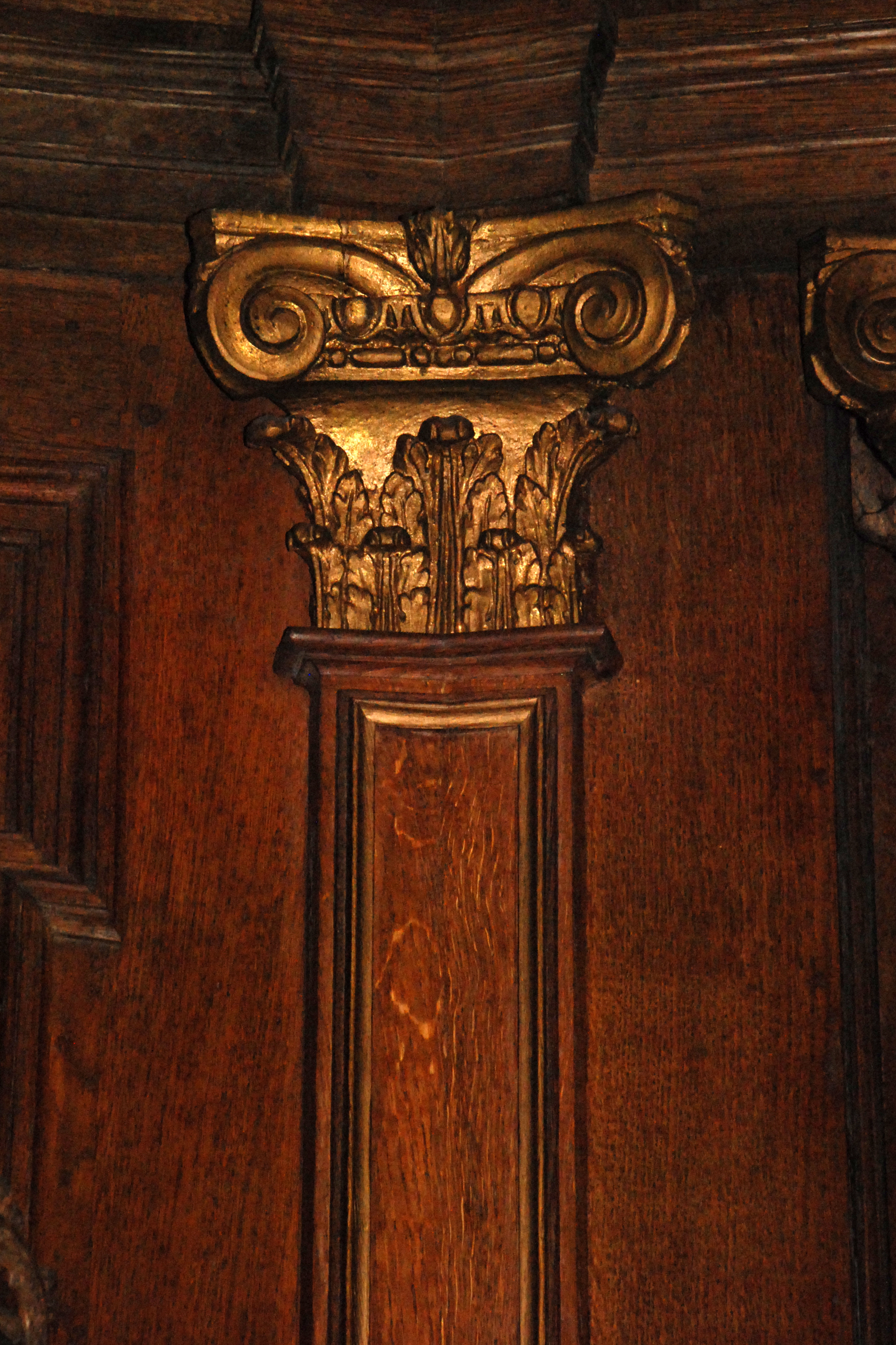 Belgique - Brabant wallon - Ottignies - Église Saint-Rémi